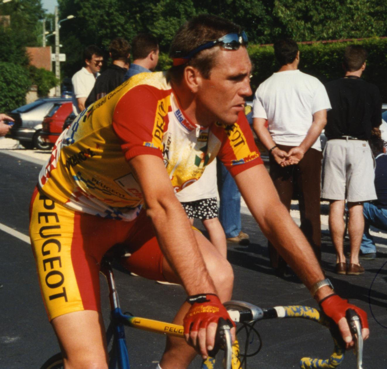 CRITERIUM DE LEVES 1996